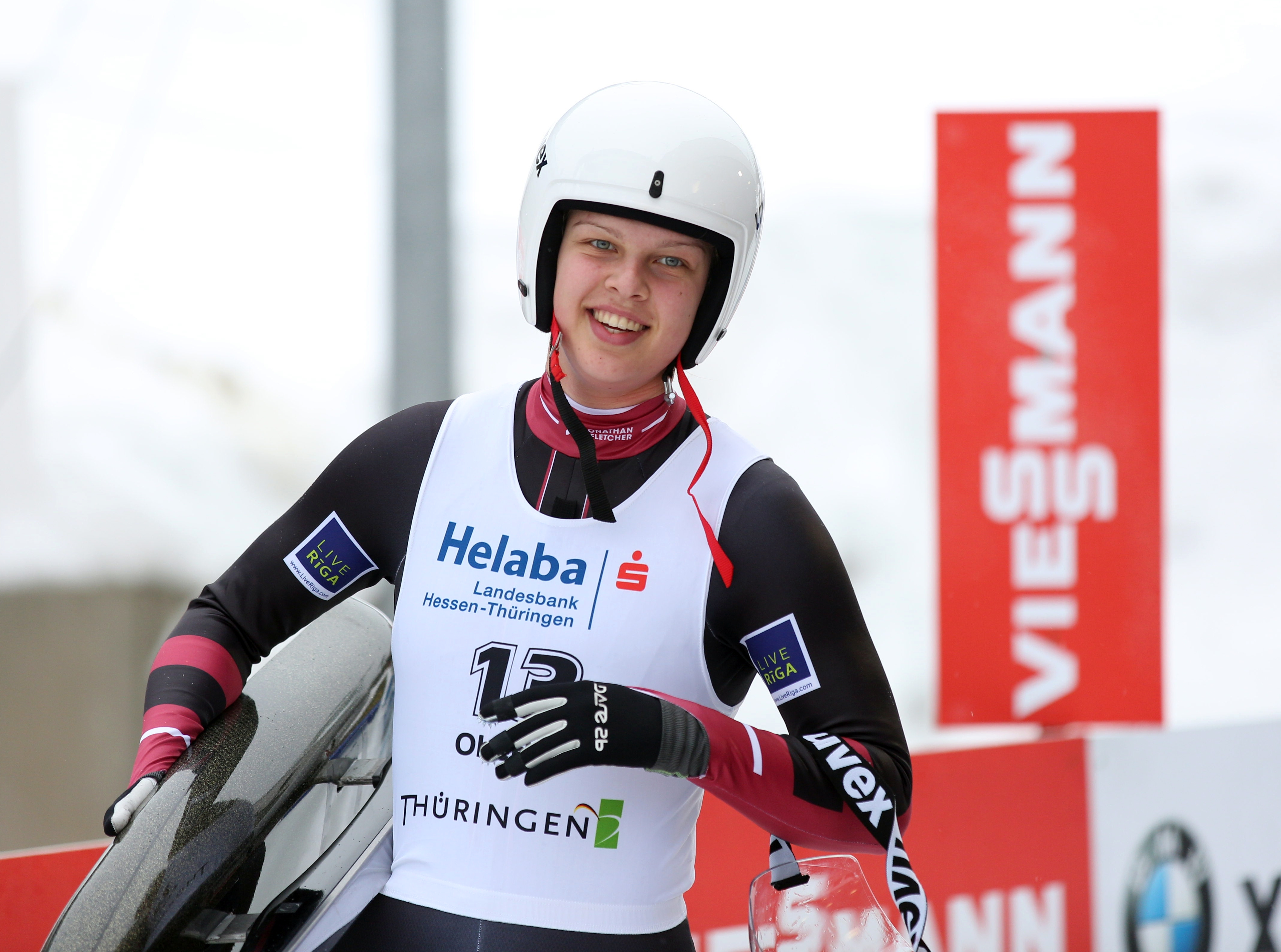 Kendija Aparjode beim HELABA Nationscup der Damen in Oberhof 2017